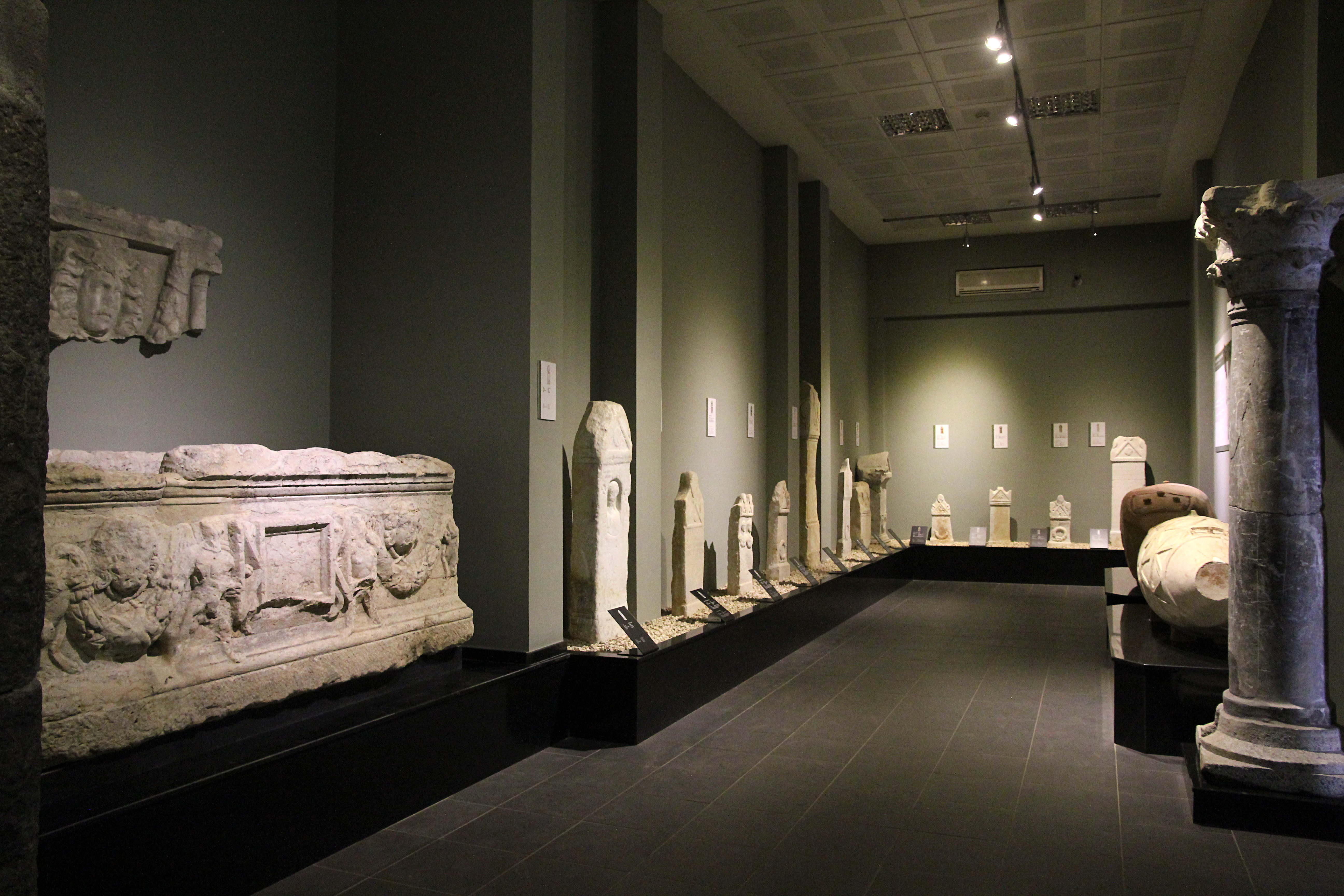 Archäologisches Museum Kahramanmaraş, Türkei, Saal der Steinobjekte